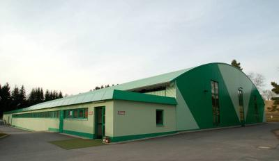 Haupteingang Wolfsbau